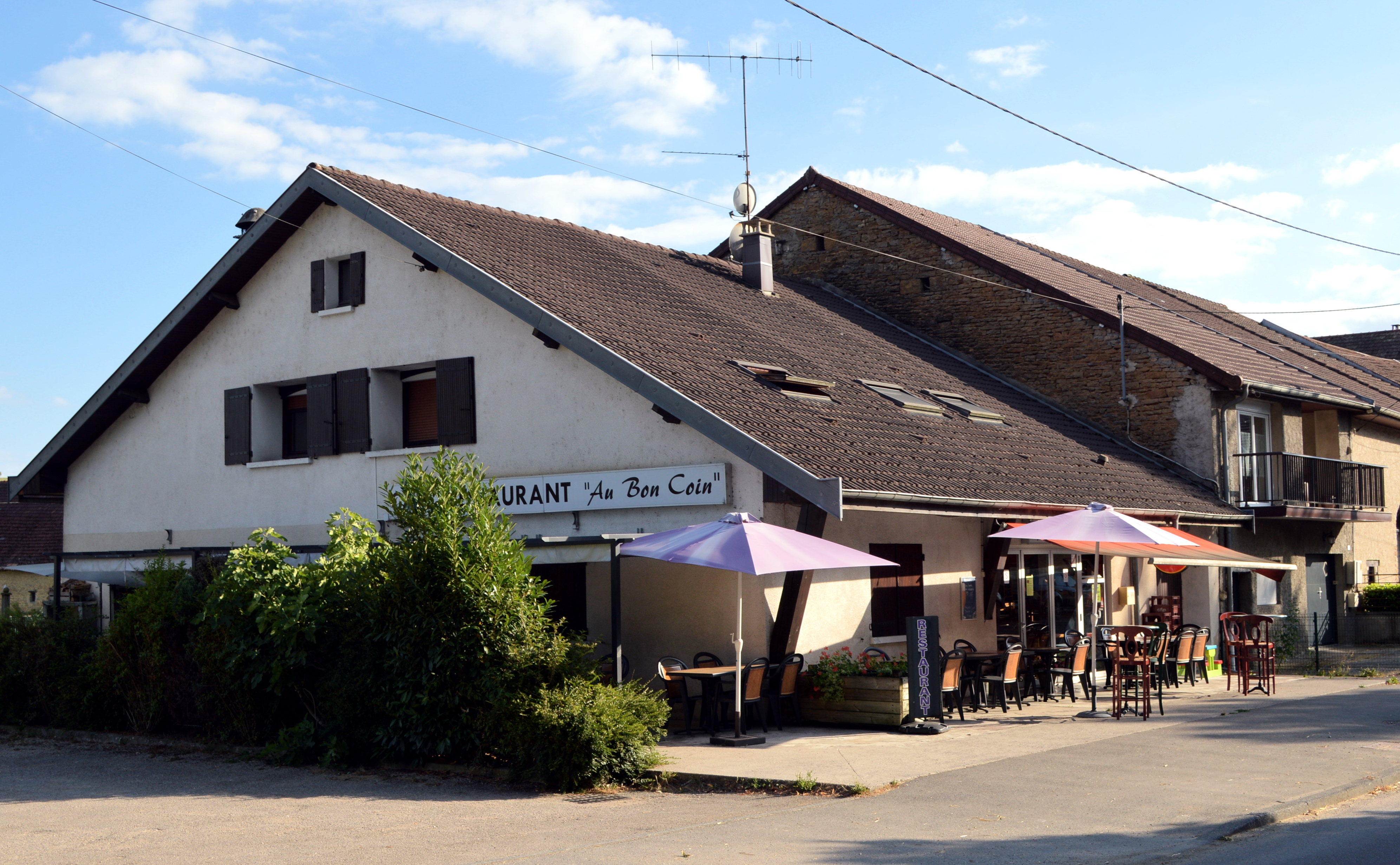 Vue extérieure du bar-restaurant "Au bon coin" à Noironte, en juillet 2018.